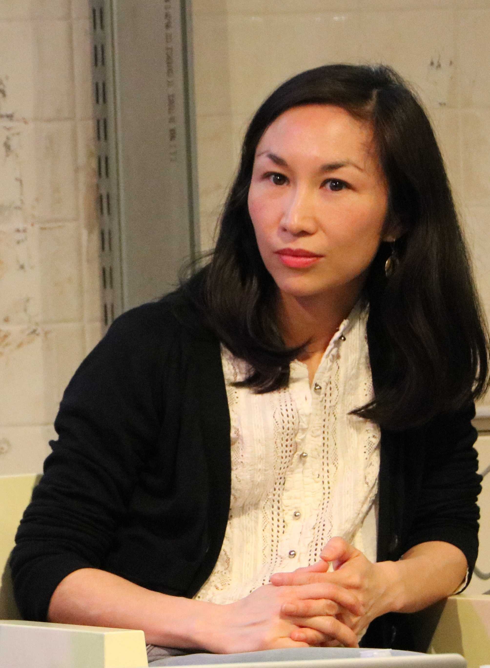 Loo Hui Phang - Festival Atlantide - Lieu Unique - Nantes - 4 mars 2017